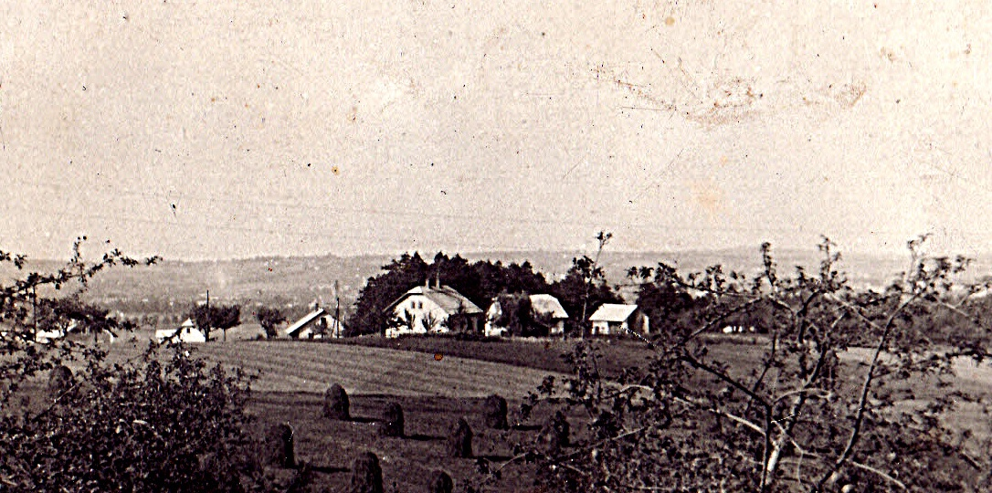 Template:Dolní Žukov